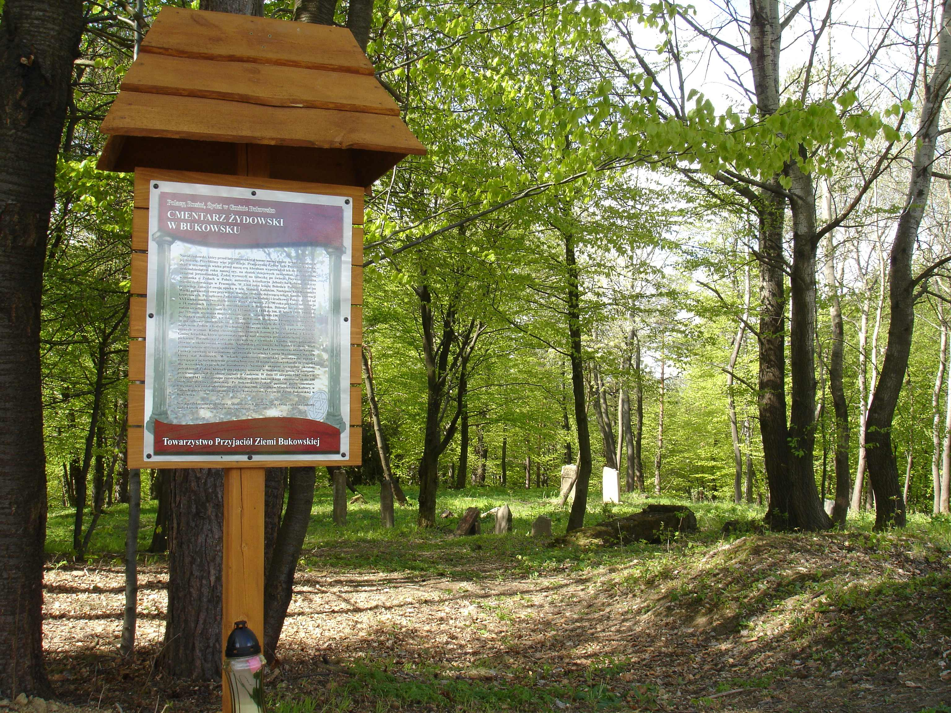 Bukowsko jewish cemetery